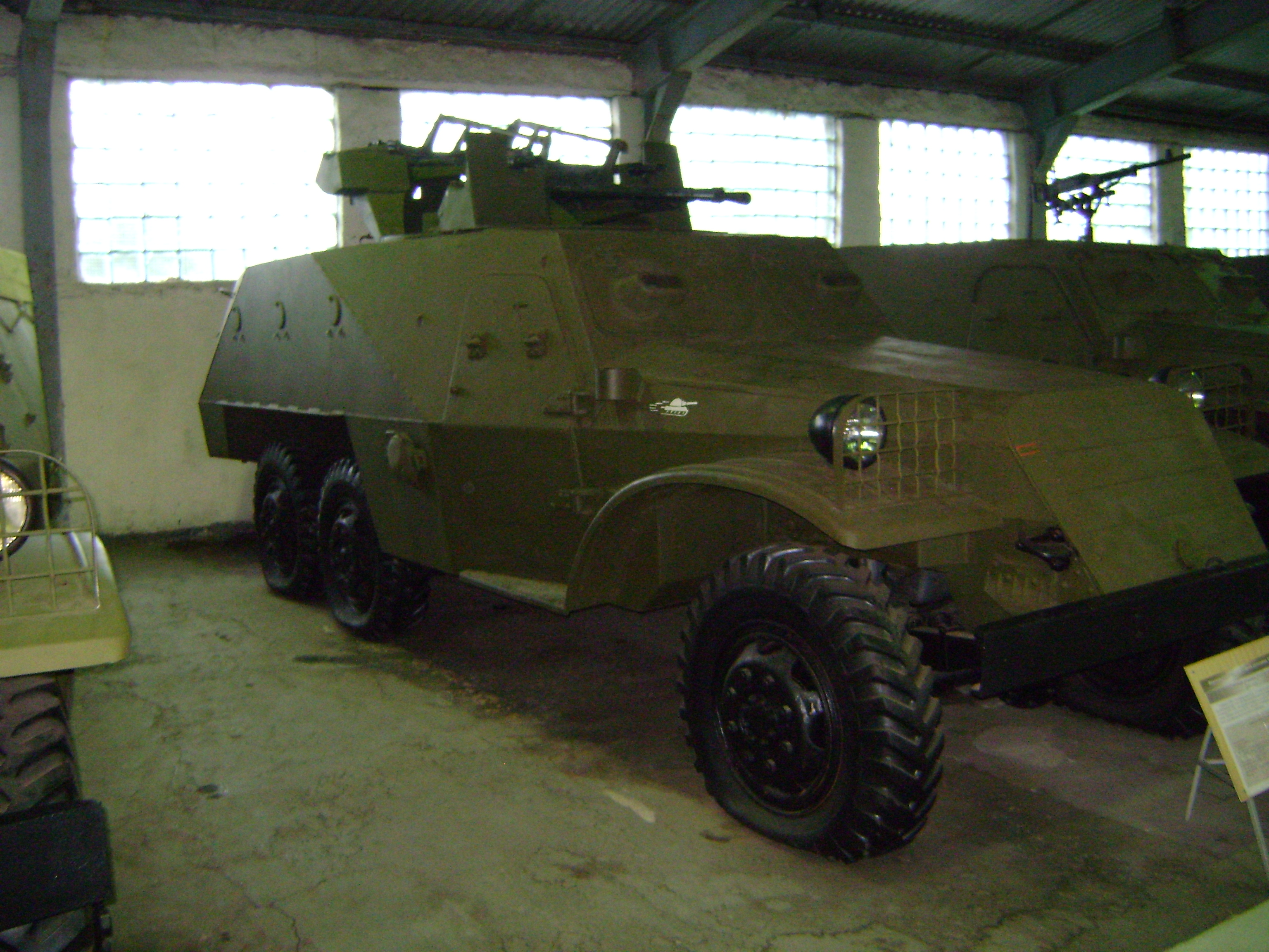 Tank Museum, Kubinka